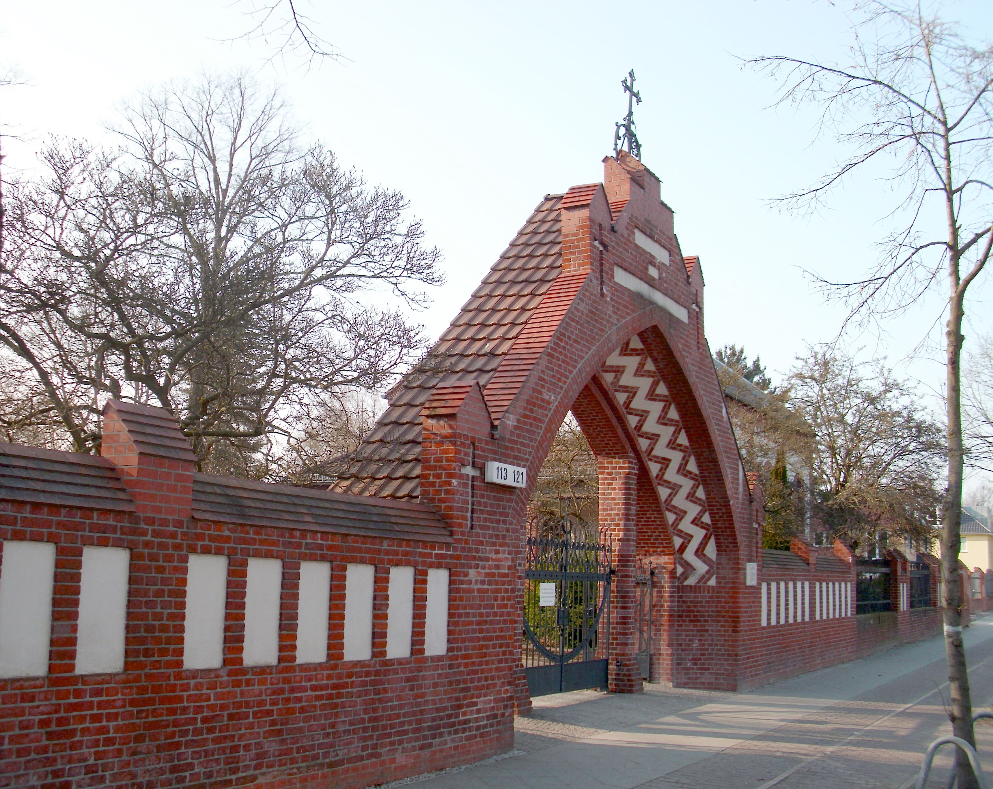 Baudenkmal Lutherkirchhof, Malteserstraße 113-121, 12247 Berlin